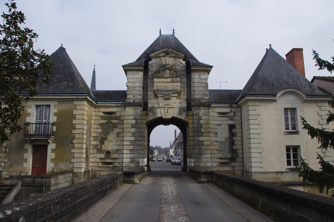 Porte de Loudun, à Richelieu (Indre-et-Loire)